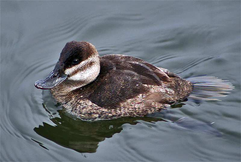 Taken 1/27/07 at Lake Merritt in Oakland, CA.